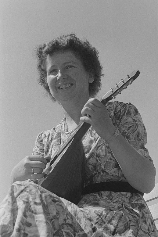 Original image description from the Deutsche FotothekMandolinenspielerin